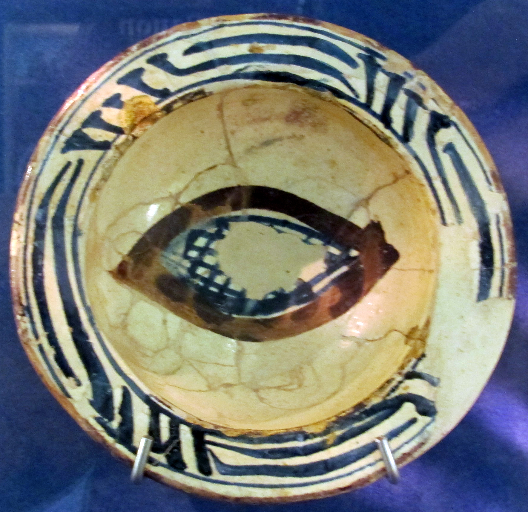 Museo diocesano (San Miniato)